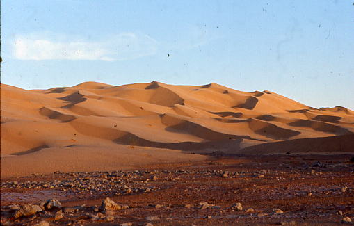 Région des gravures préhistoriques de Taghit (Algérie)